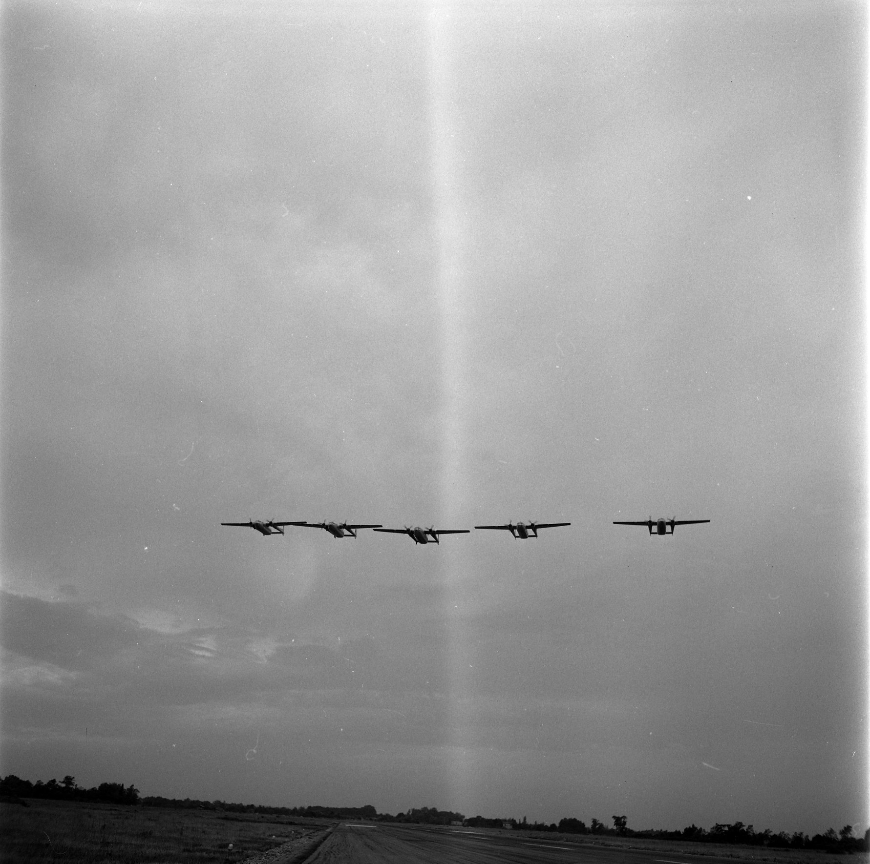 Base aérienne de Francazal (route de Seysses). 9 juin 1963. Meeting aérien : vue d'ensemble en contre-plongée de cinq avions de transport militaires "Nord 2501" du Centre d'Instruction des Equipages de Transport (CIET) effectuant des exercices de vols (avions alignés). Cliché pris lors d'une journée portes ouvertes organisée sur la base.